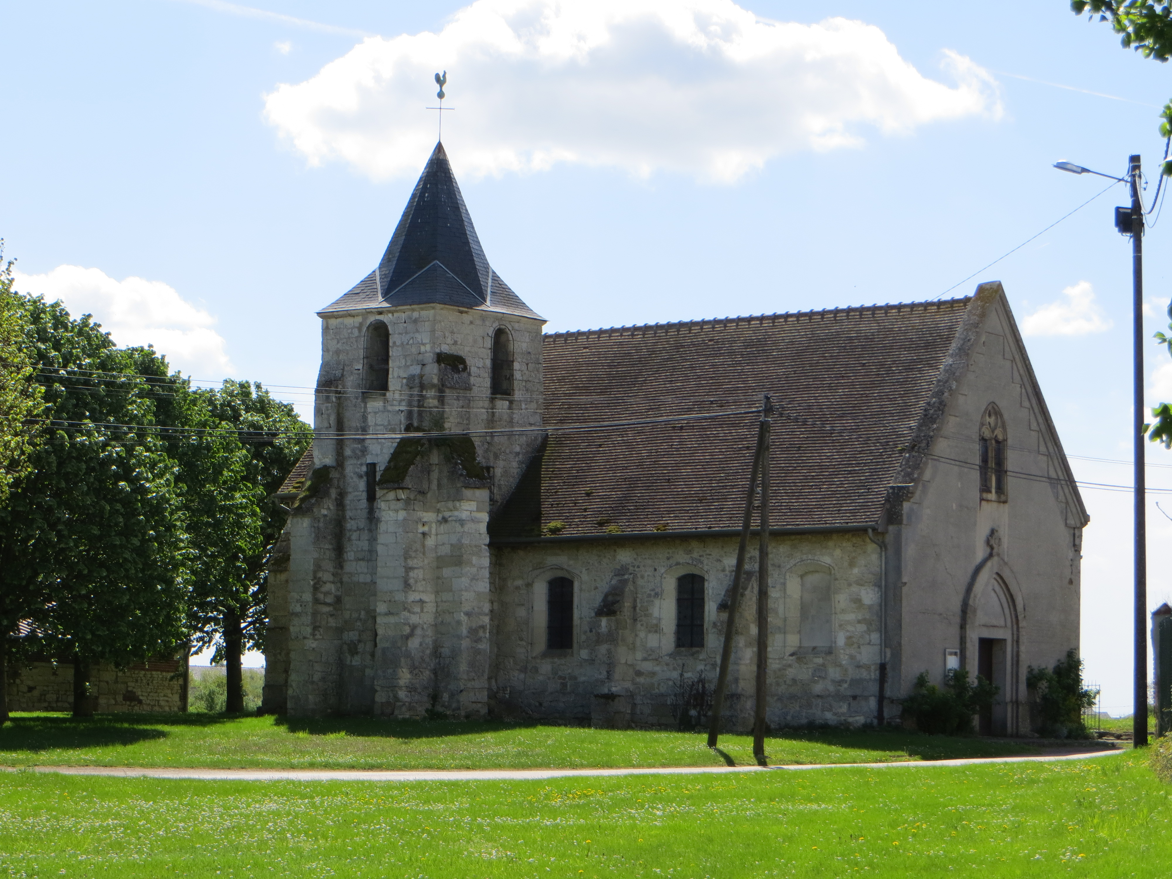 Vue générale de l'église